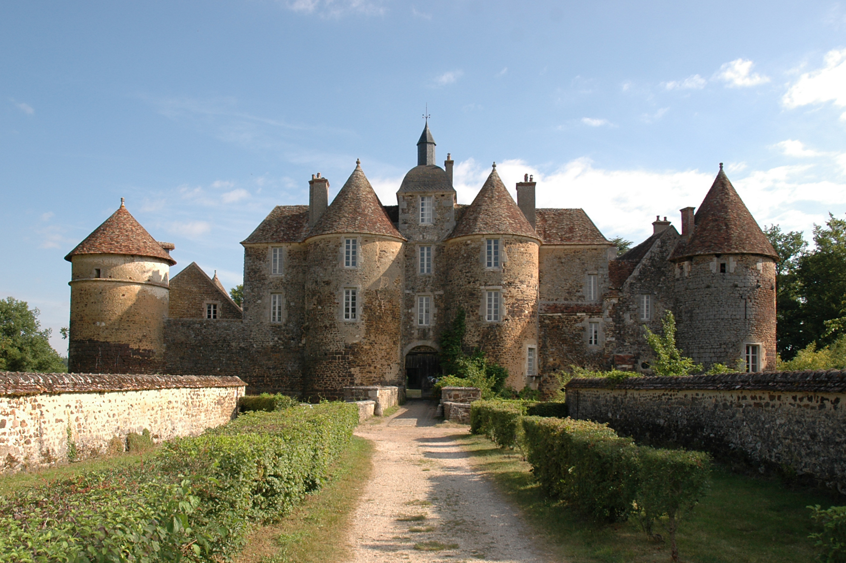 Infos zum Schloss gibt es in der Wikipedia.